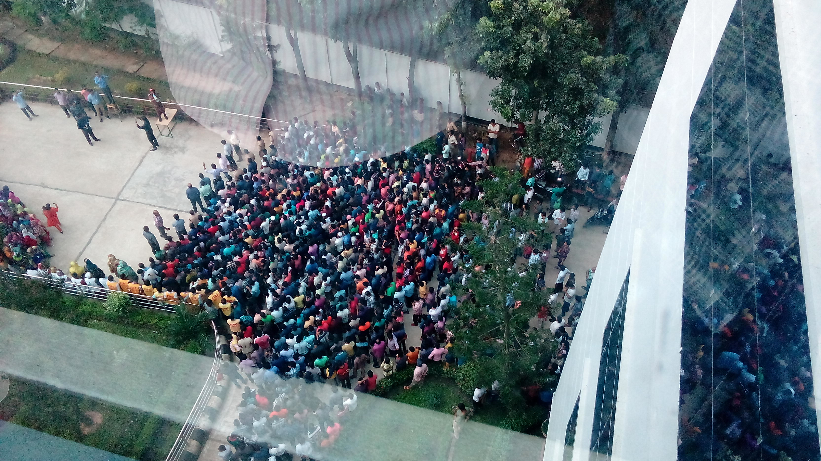 masterbari, bhaluka